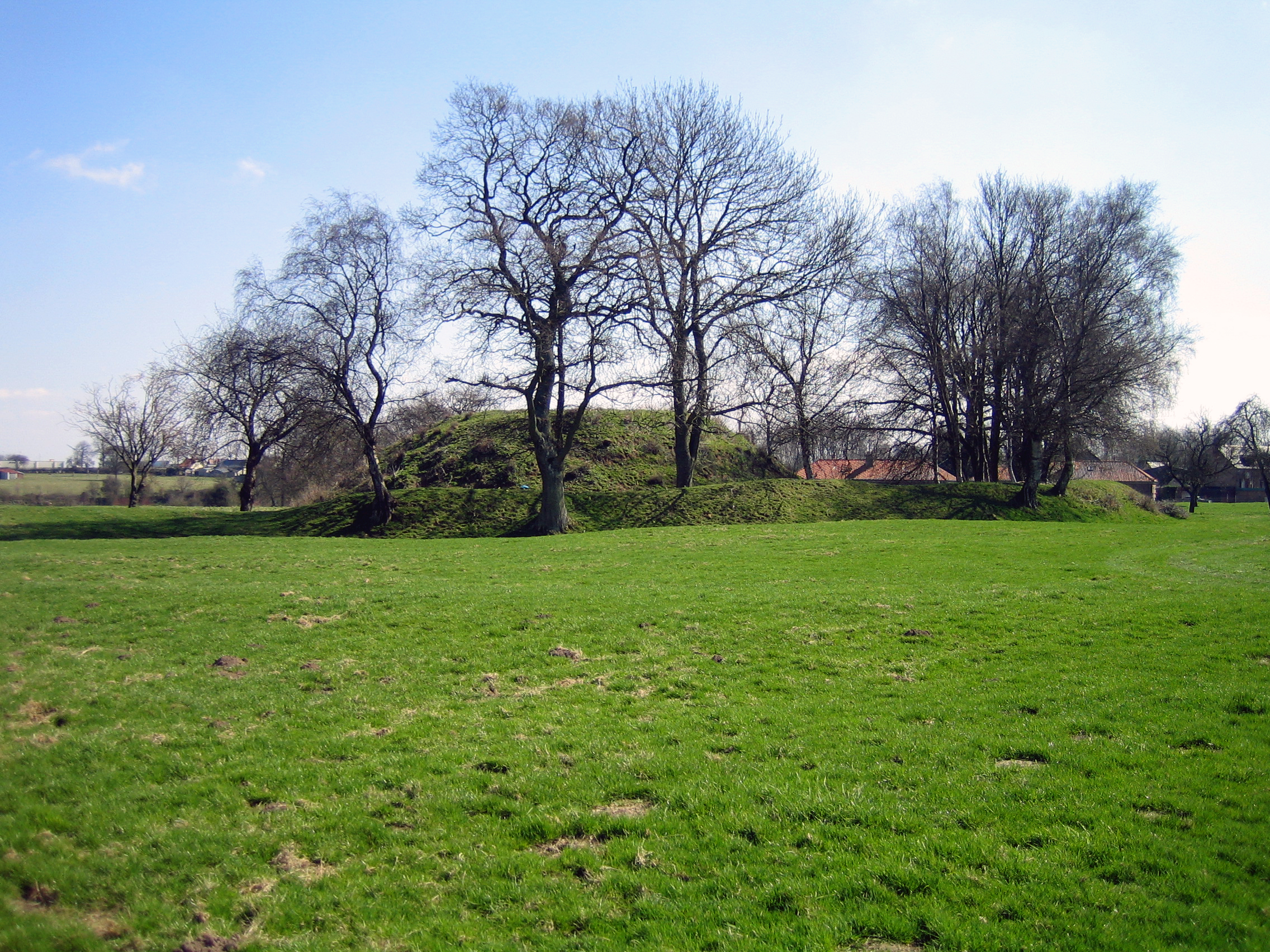 Fressenneville (Somme, France) La motte castrale. On remarque bien la levée de terre encerclant la butte dont le sommet est parfaitement plat. La photo est prise en direction du Sud-Est (en bordure de propriété depuis la route).